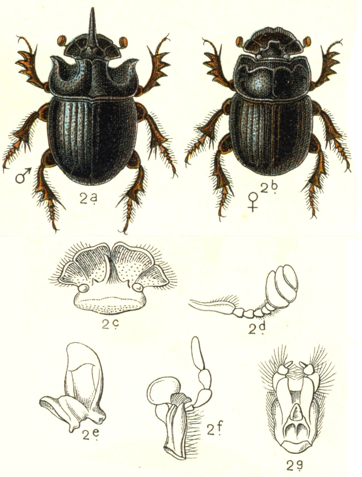 Fauna Germanica. Die Käfer des Deutschen Reiches. I. & II. Band. Farbendrucktafeln von Dr. K.G. Lutz. K.G. Lutz' Verlag, Stuttgart 1908